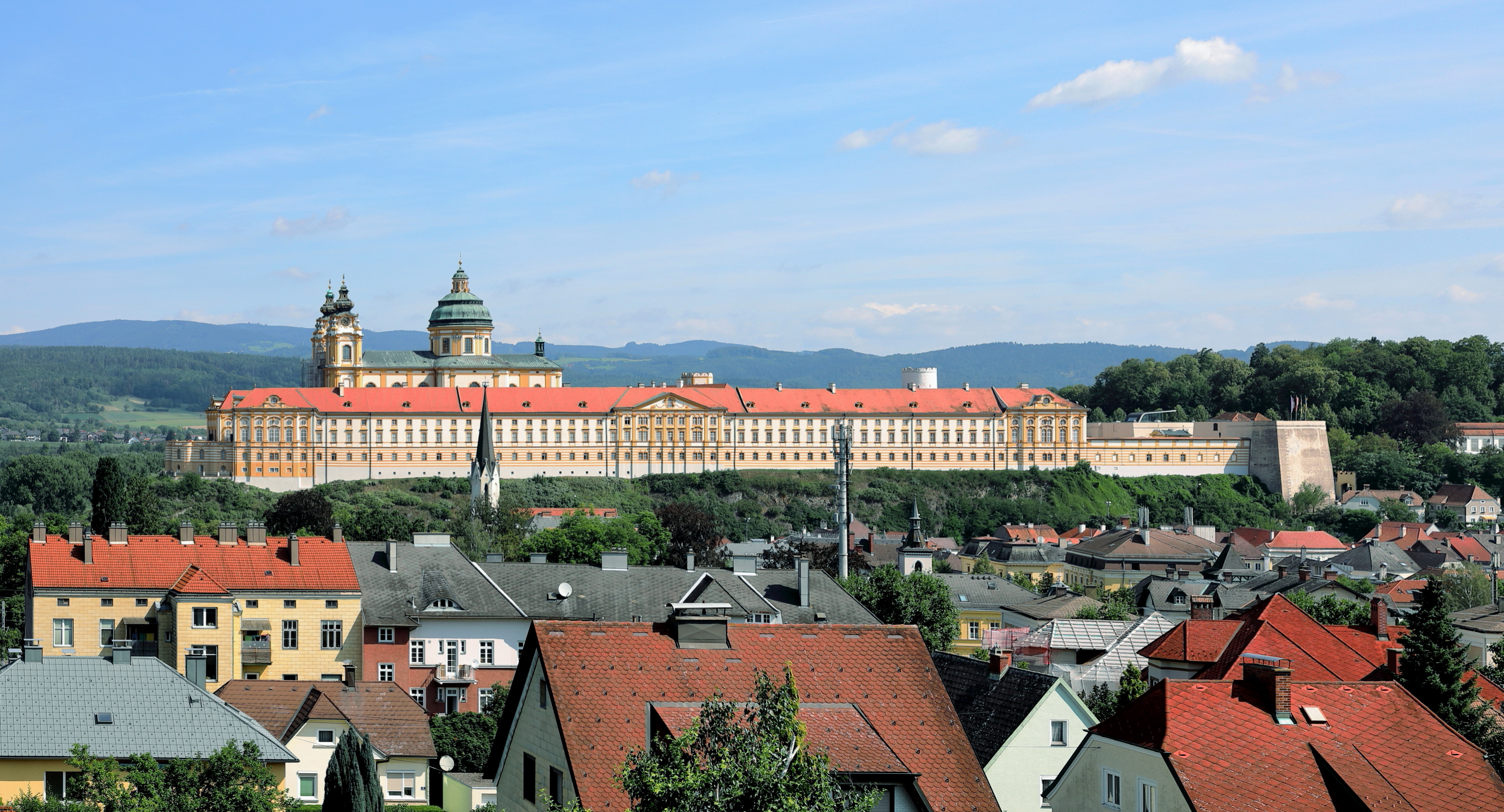 Südansicht des 1089 gegründeten Benediktinerstiftes in der niederösterreichischen Stadtgemeinde Melk. Die Stiftsanlage wurde in der 1. Hälfte des 18. Jahrhundert grundlegend umgebaut sowie erweitert und erhielt dabei im Wesentlichen ihr heutiges Erscheinungsbild.